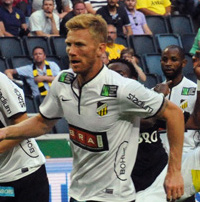 Fredrik Björck